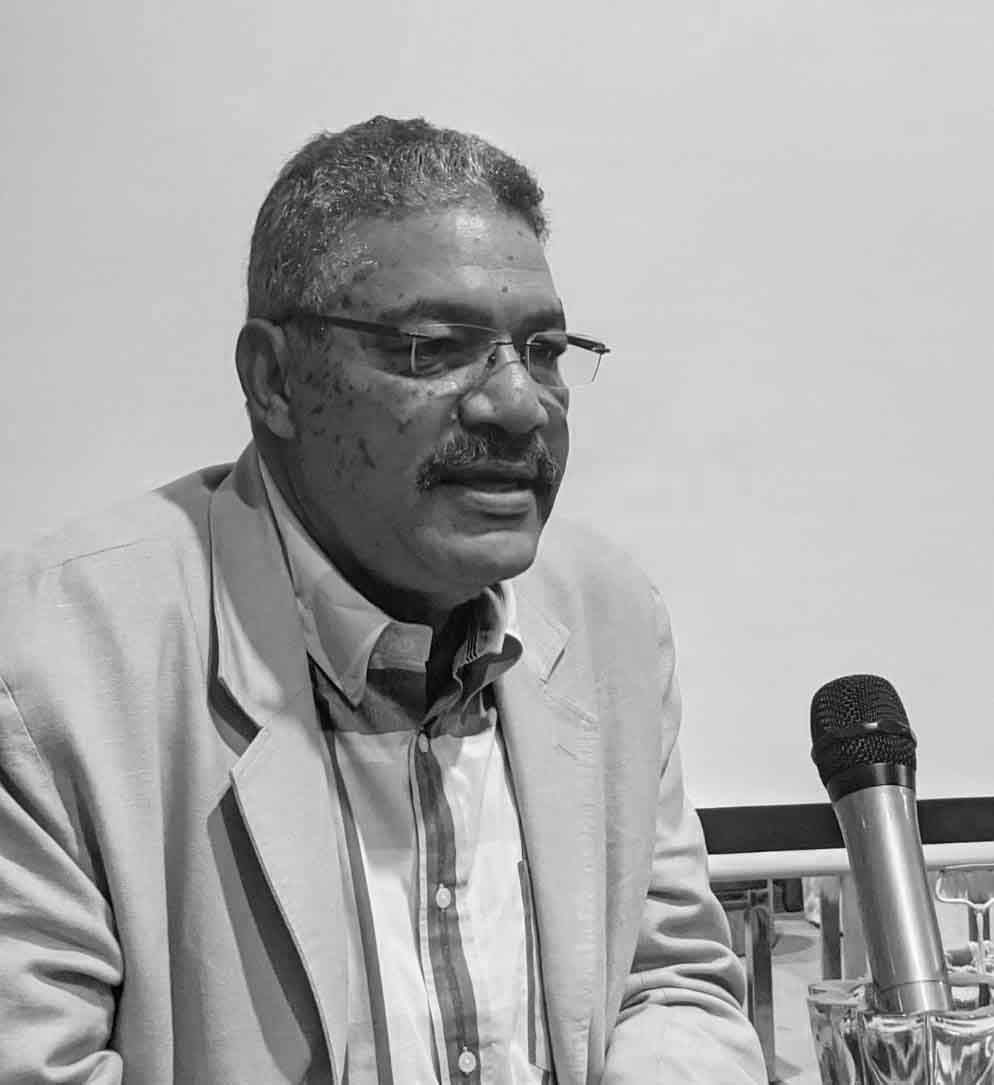 Foto of Rene Rodriguez Soriano